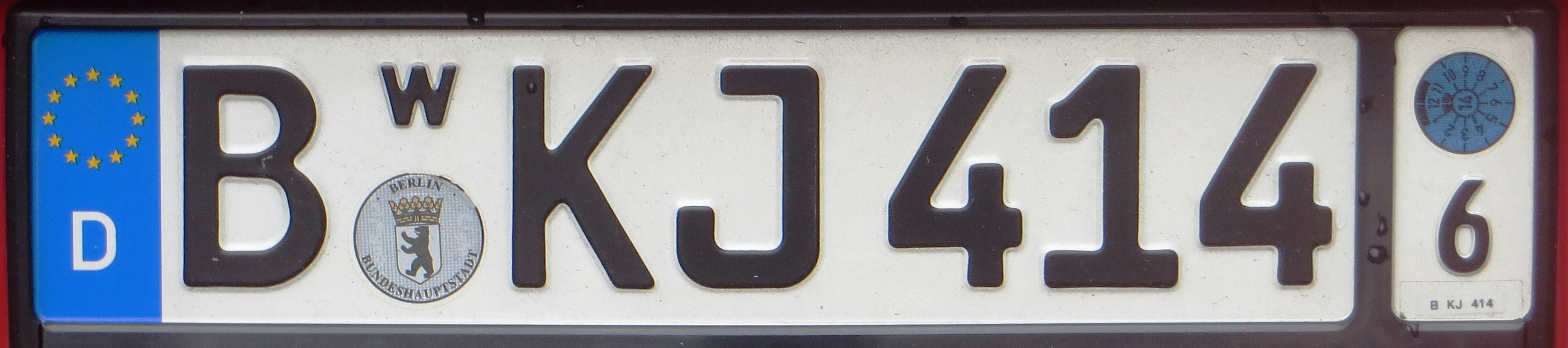 Wisselkentekenplaat Berlijn Duitsland